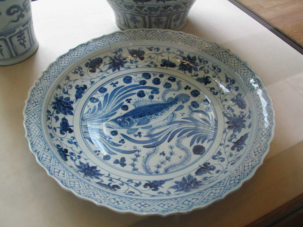 大英博物馆藏zh:元代zh:鳜鱼图案青花瓷盘